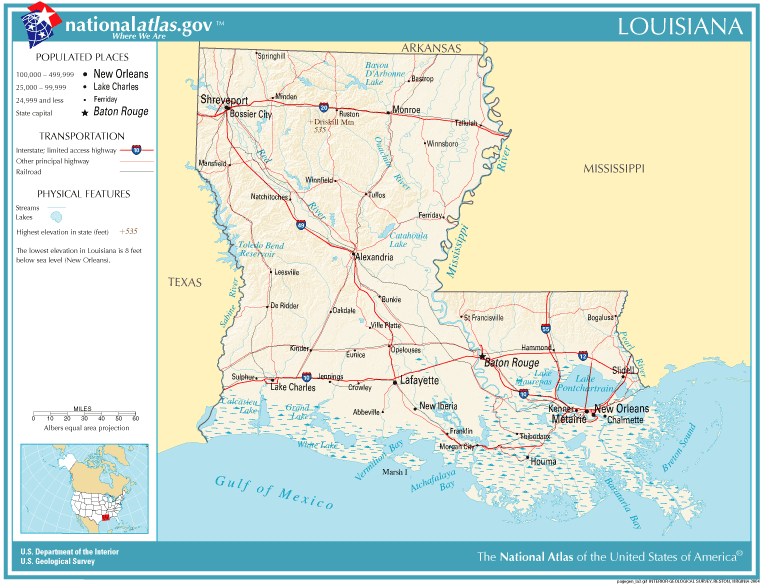 Louisiana map